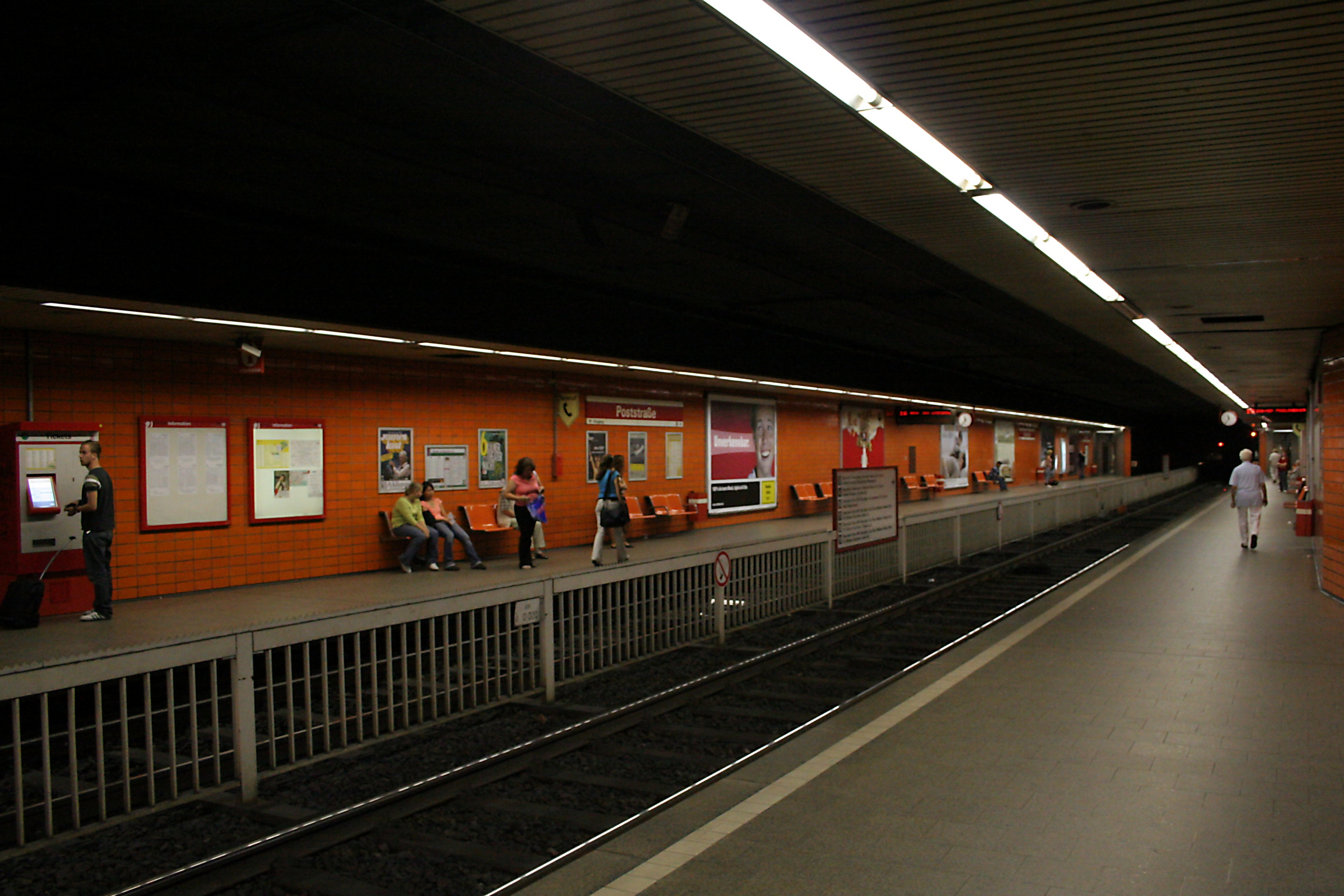 Stadtbahnhaltestelle Poststraße in Köln, Zustand 2006